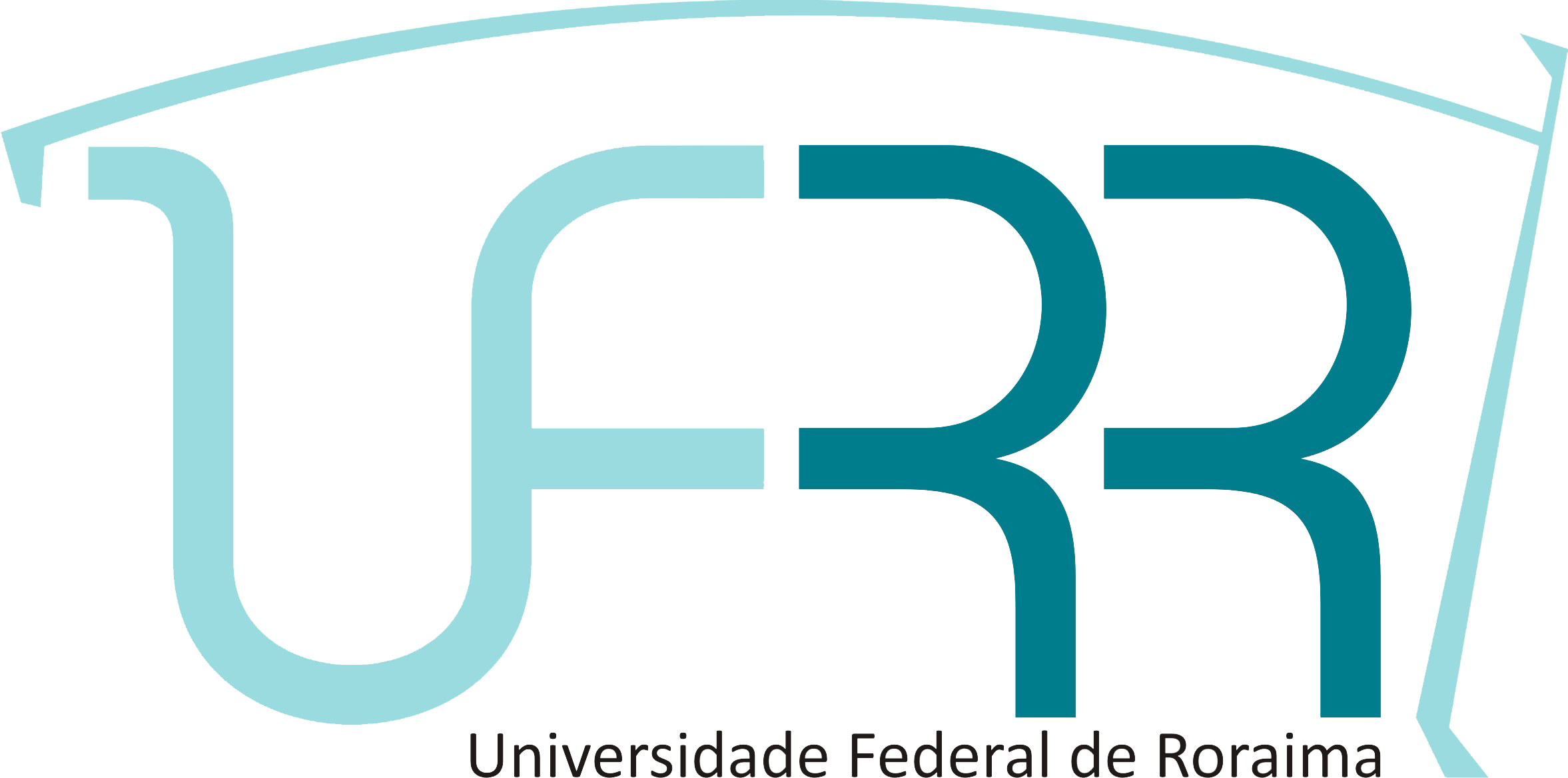 Nova logomarca da Universidade Federal de Roraima.